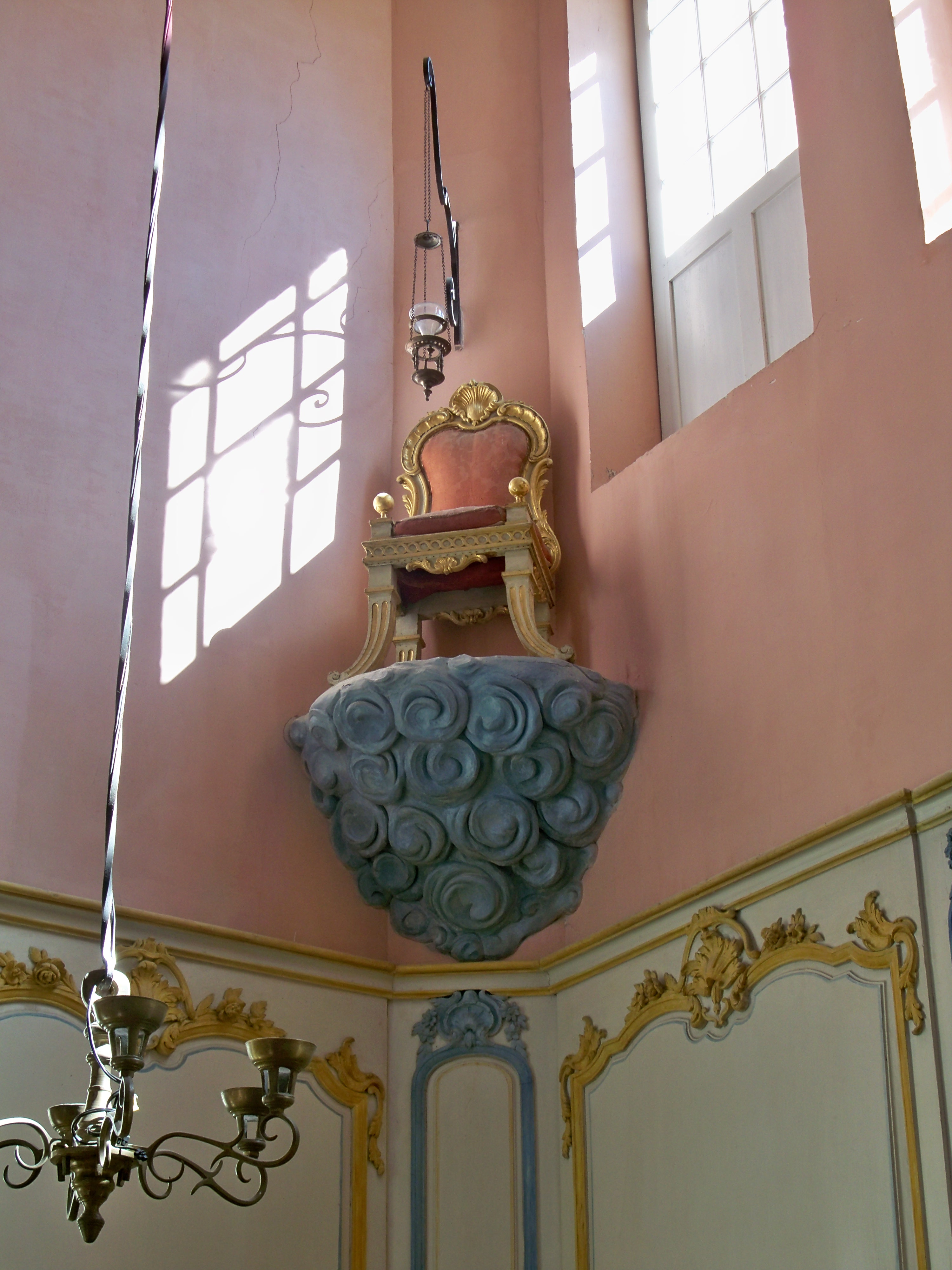 Synagogue de Cavaillon, Vaucluse, France